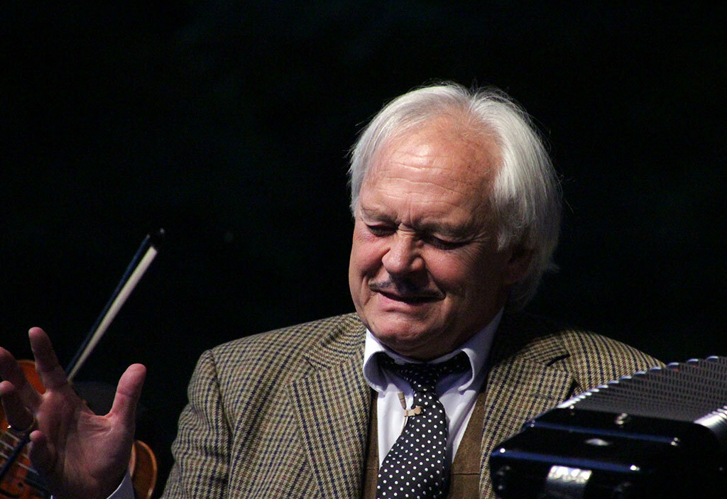 Benkő Péter (Budapest, 1947. június 1. –) kétszeres Jászai Mari-díjas magyar színművész. Benkő Gyula színművész fia.